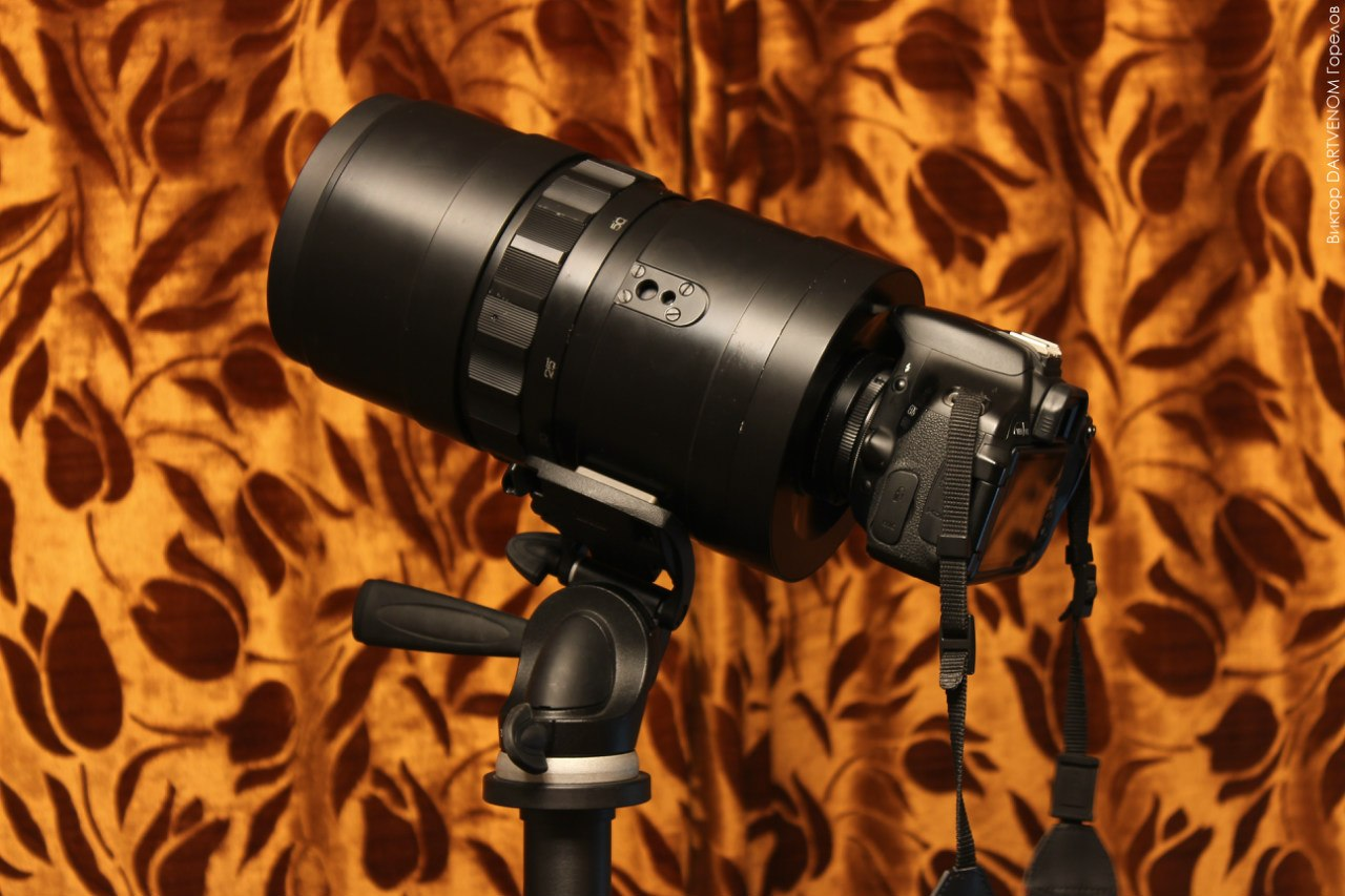 МТО-1000АМ с современной DSLR-камерой